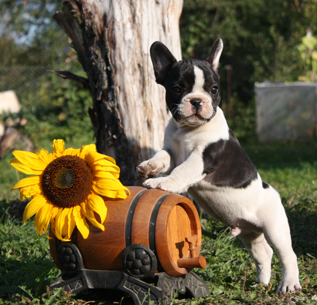 Французский бульдог бело-тигрового окраса.